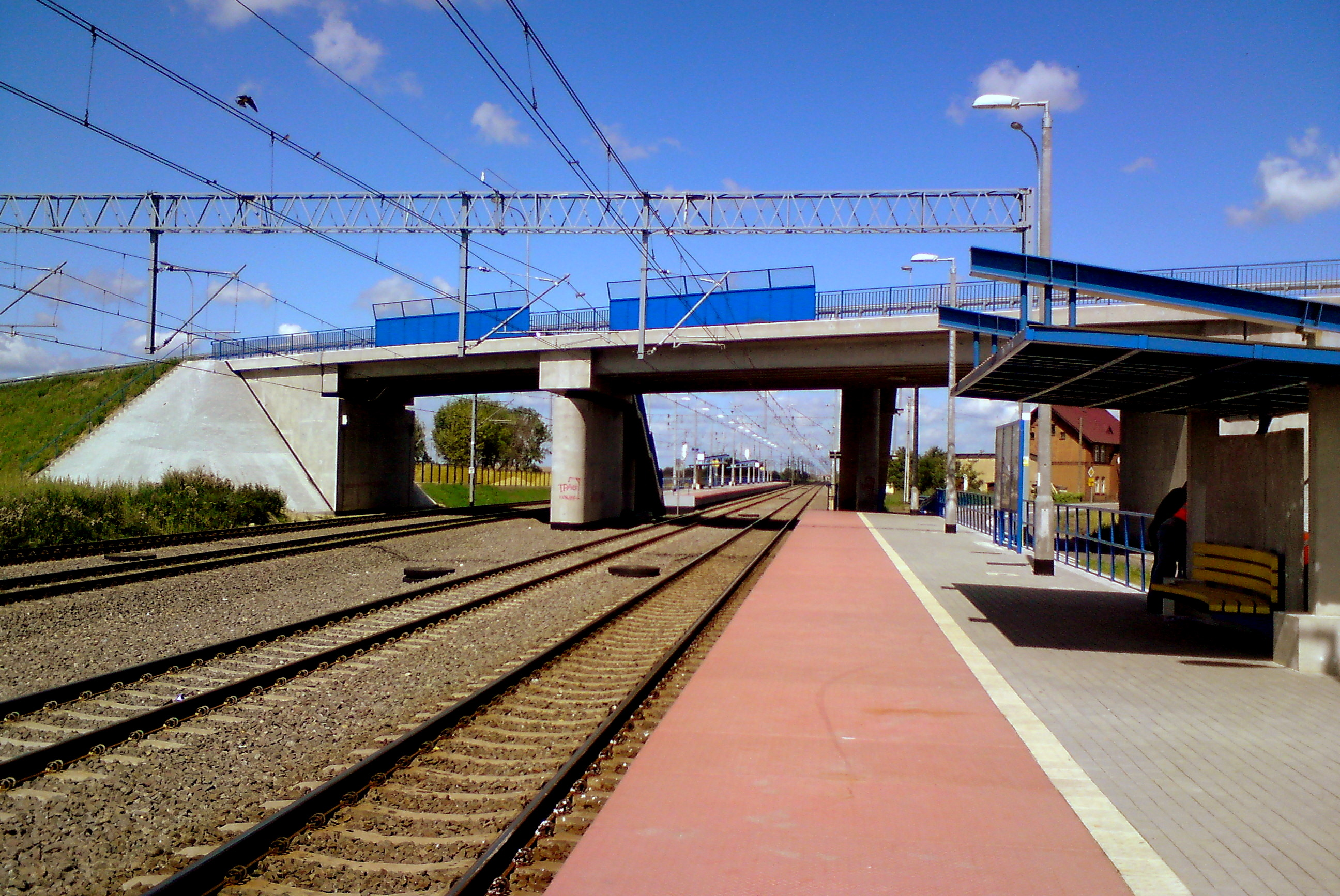 przystanek kolejowy w Miłobądzu